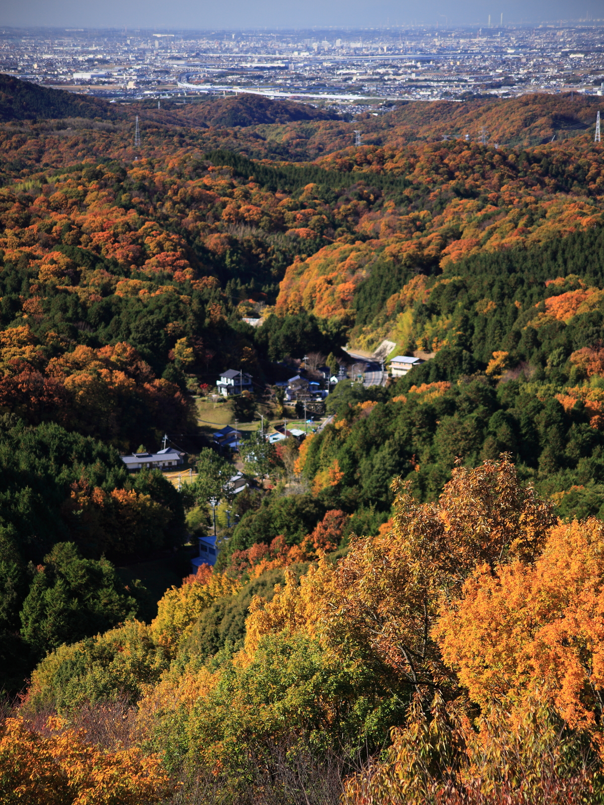 松平天望所から望む松平町（豊田市松平町、2010年）